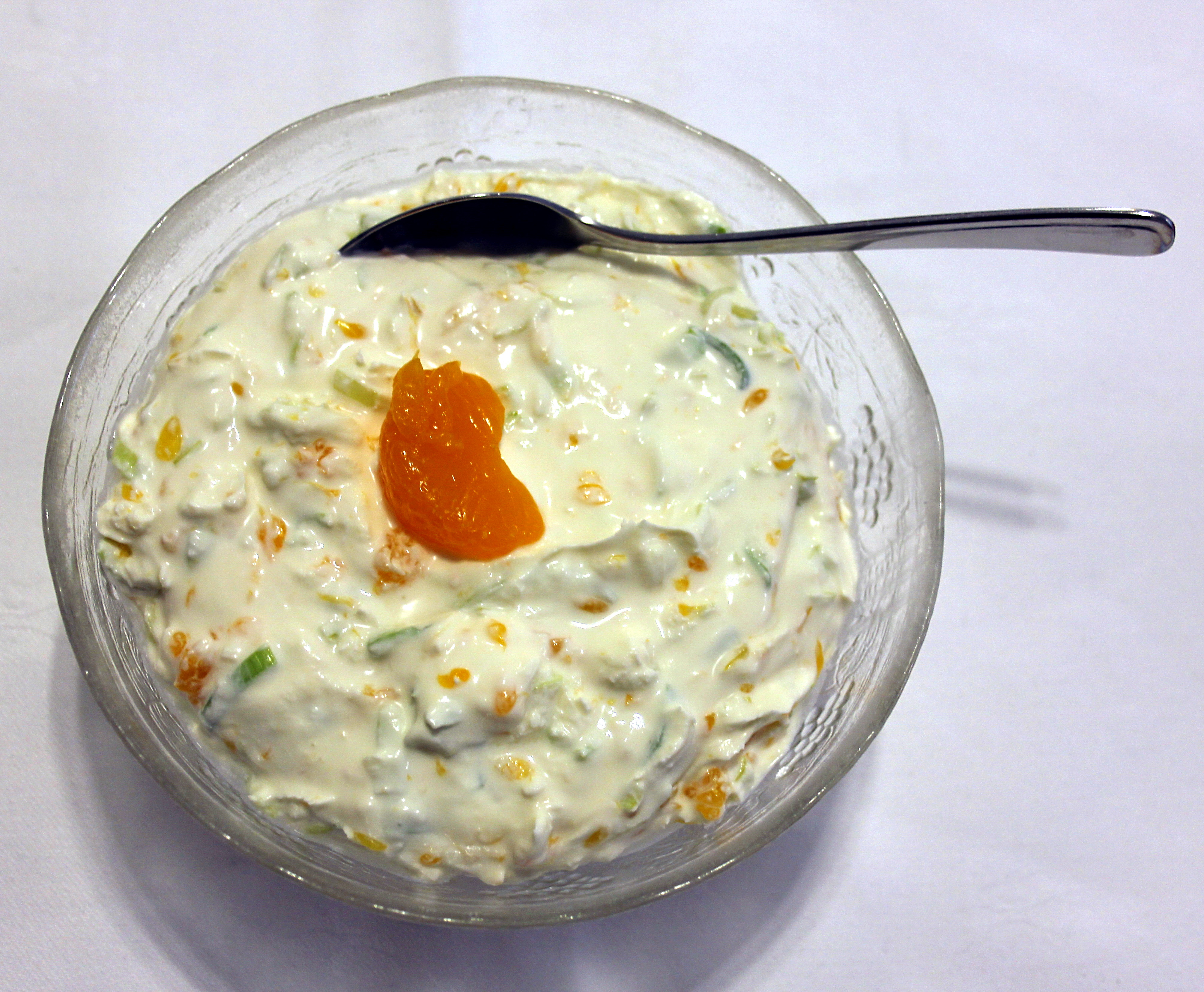 Frischkäse mit Lauch und Manderinen